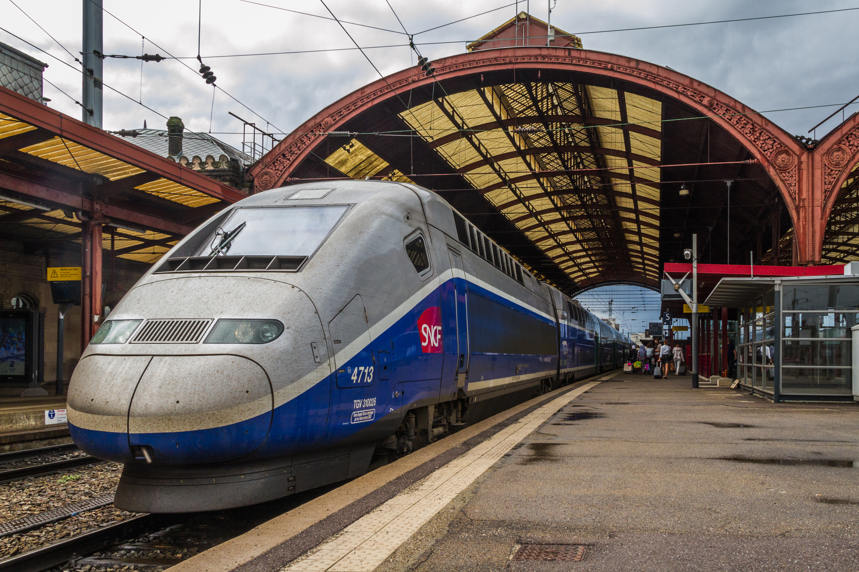 Strasbourg Gare Centrale voies 2_3 rames TGV